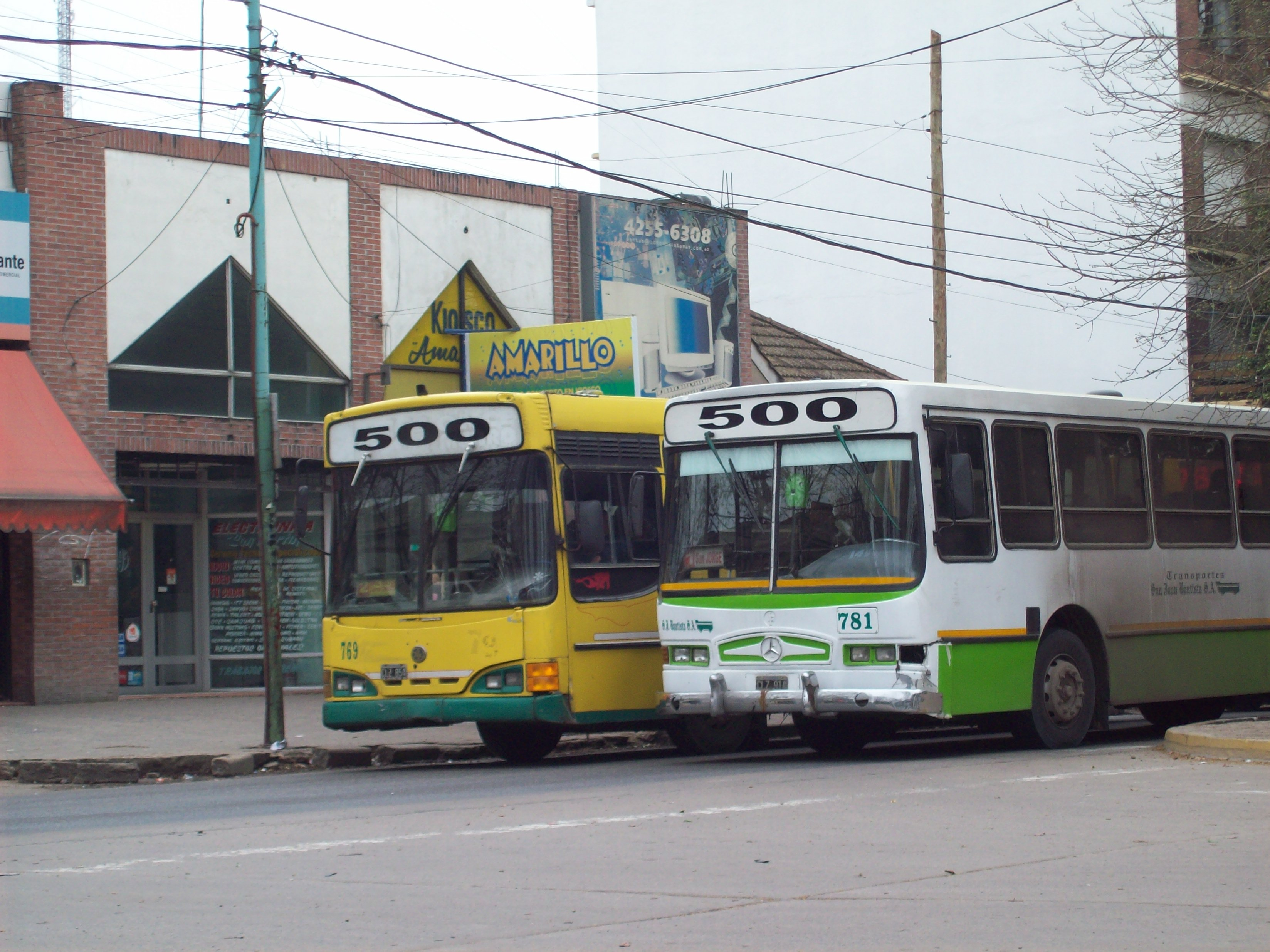 Línea 500, ramal 2 (amarillo) y 1 (blanco), cuando aún circulan unidades con los colores del Hálcon SA.